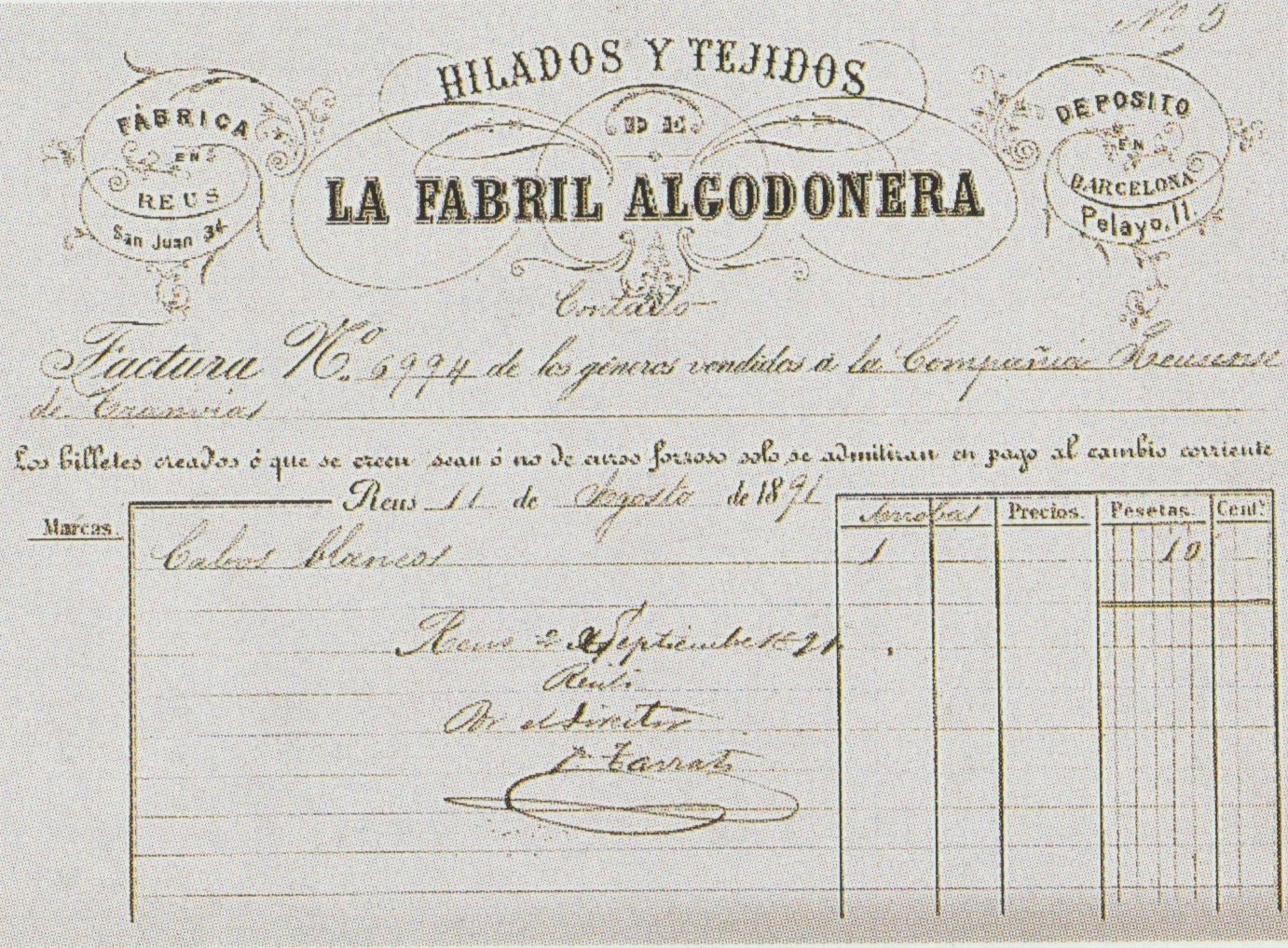 Factura de 1891 de la Fabril Algodonera